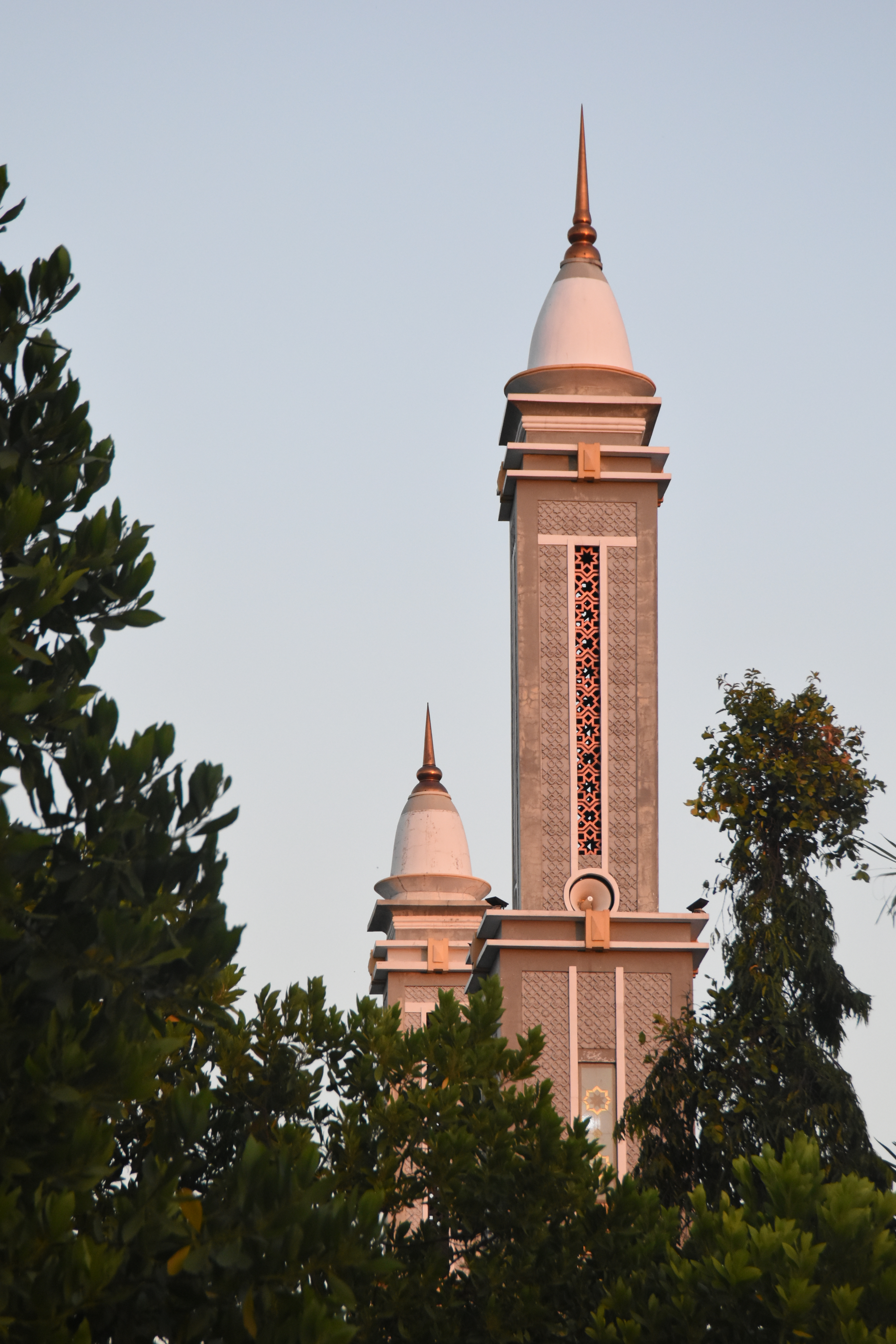 Masjid besar di Juwana yang menjadi landmark Kota Juwana terlihat dari Jalan Pantura.